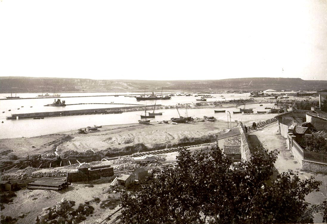 Вътрешната част на Пристанище Варна при строежа на кейовите стени и направата на насипното равнище, изглед към южния бряг на Варненския залив с кварталите Аспарухово и (частично) Галата